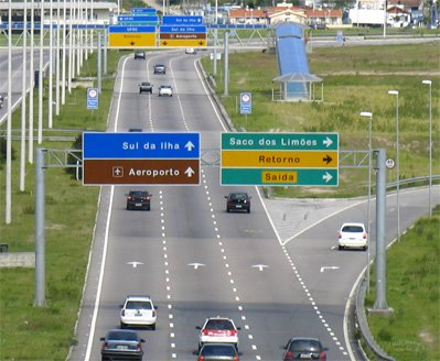 Foto tirada na saída do Túnel Antonieta de Barros, cidade de Florianópolis/SC - Brasil.